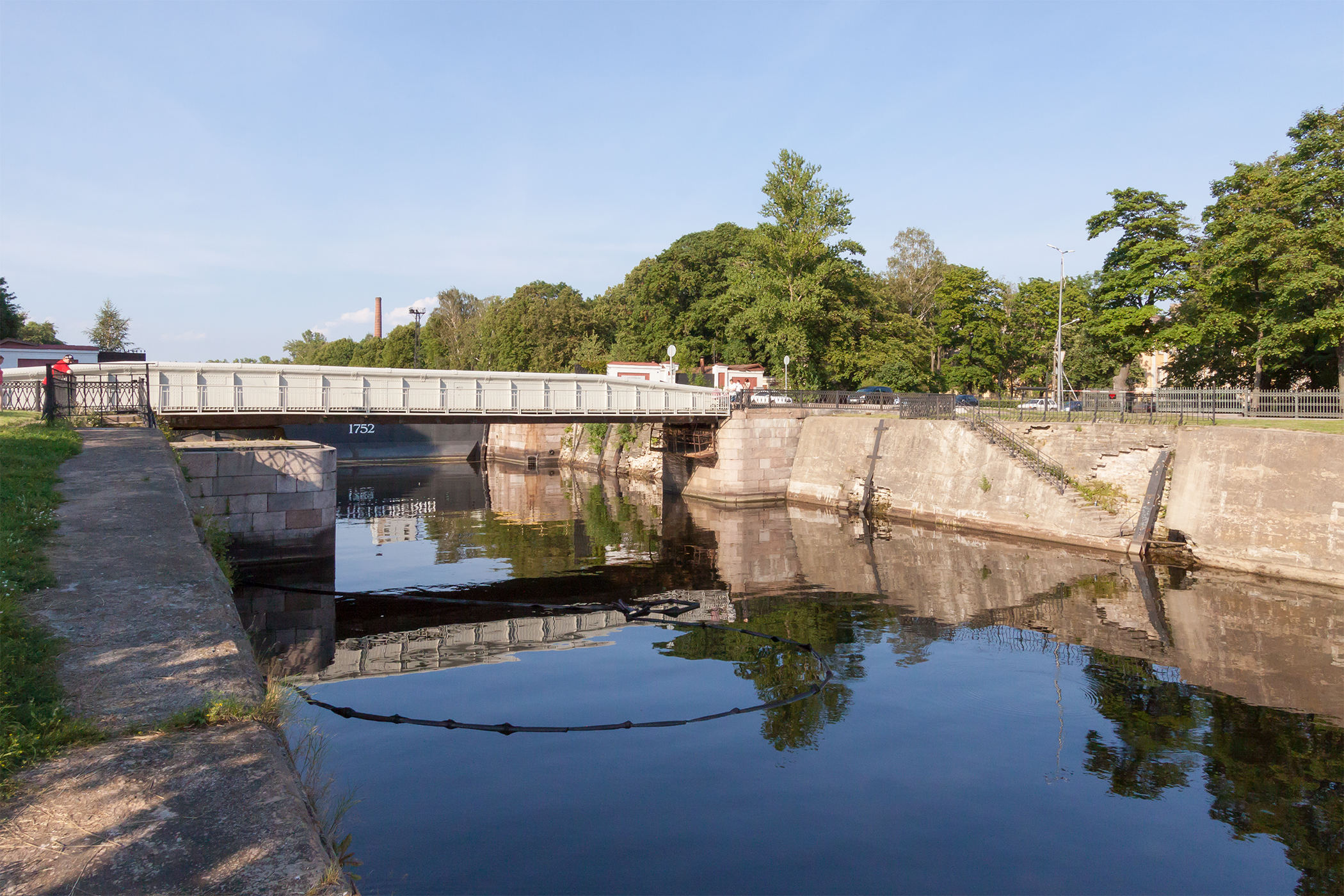 Мост доковый: Адмиралтейство, Кронштадт, Кронштадтский район, Санкт-Петербург